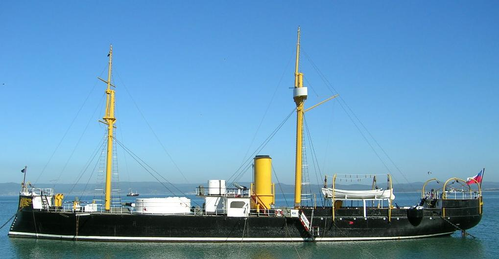 Reliquia histórica y museo monitor Huáscar fondeado frente a la base naval de Talcahuano.